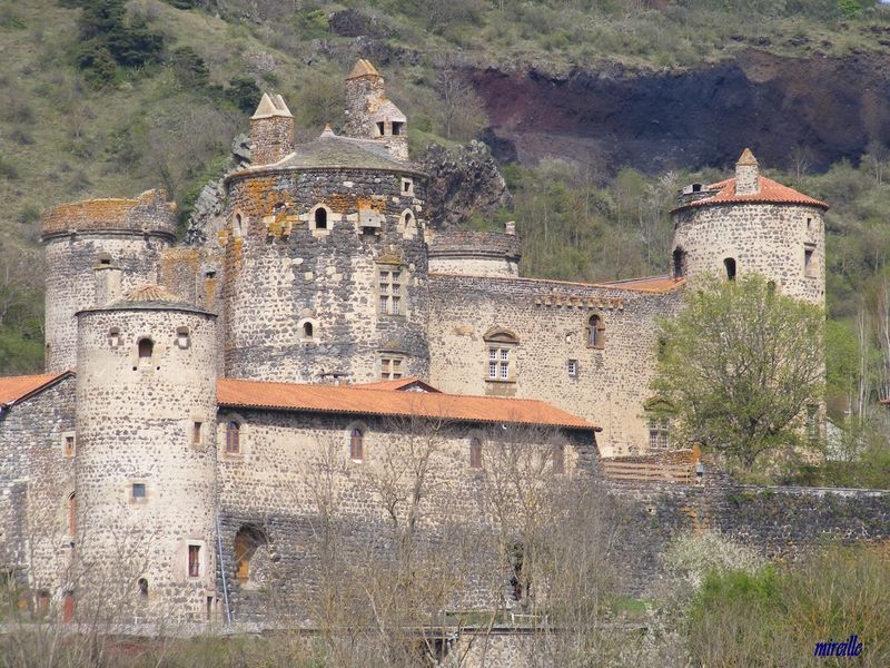 Castle of Saint Vidal